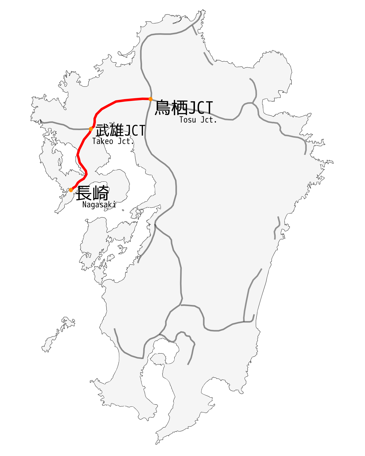 長崎自動車道の路線図。